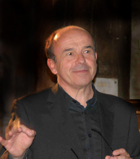 Chef de choeur